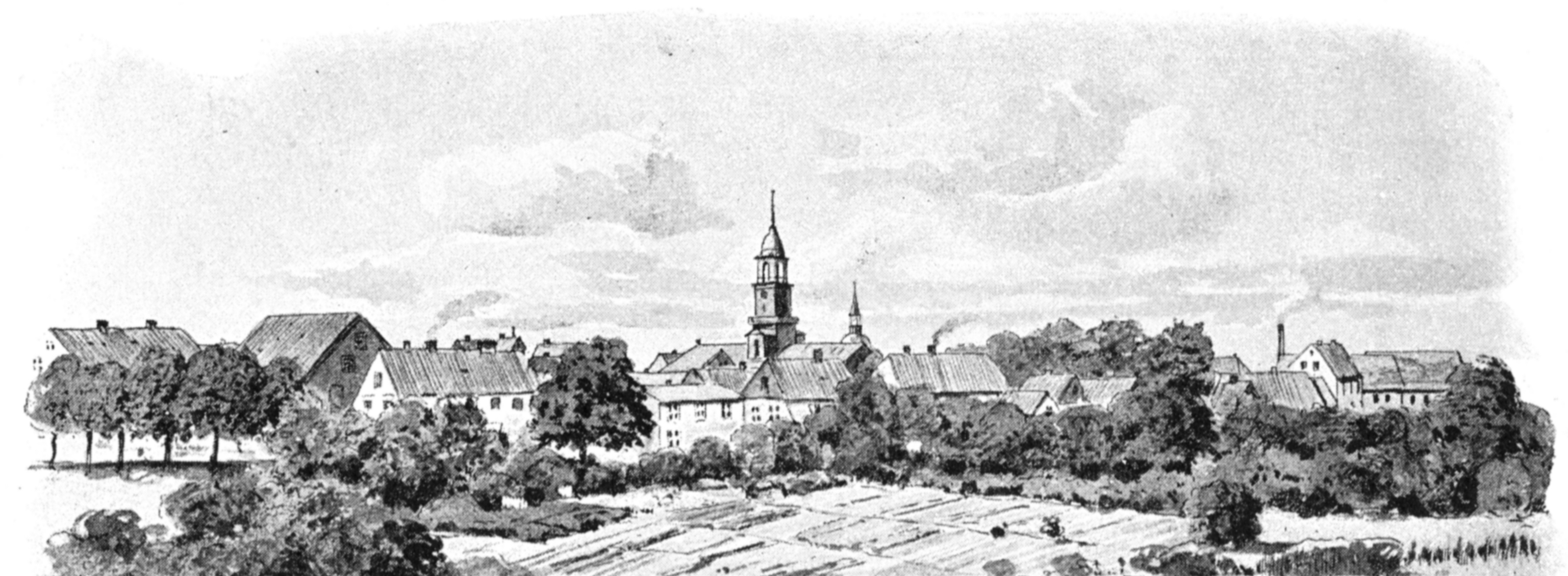 Friedrichstadt um 1895